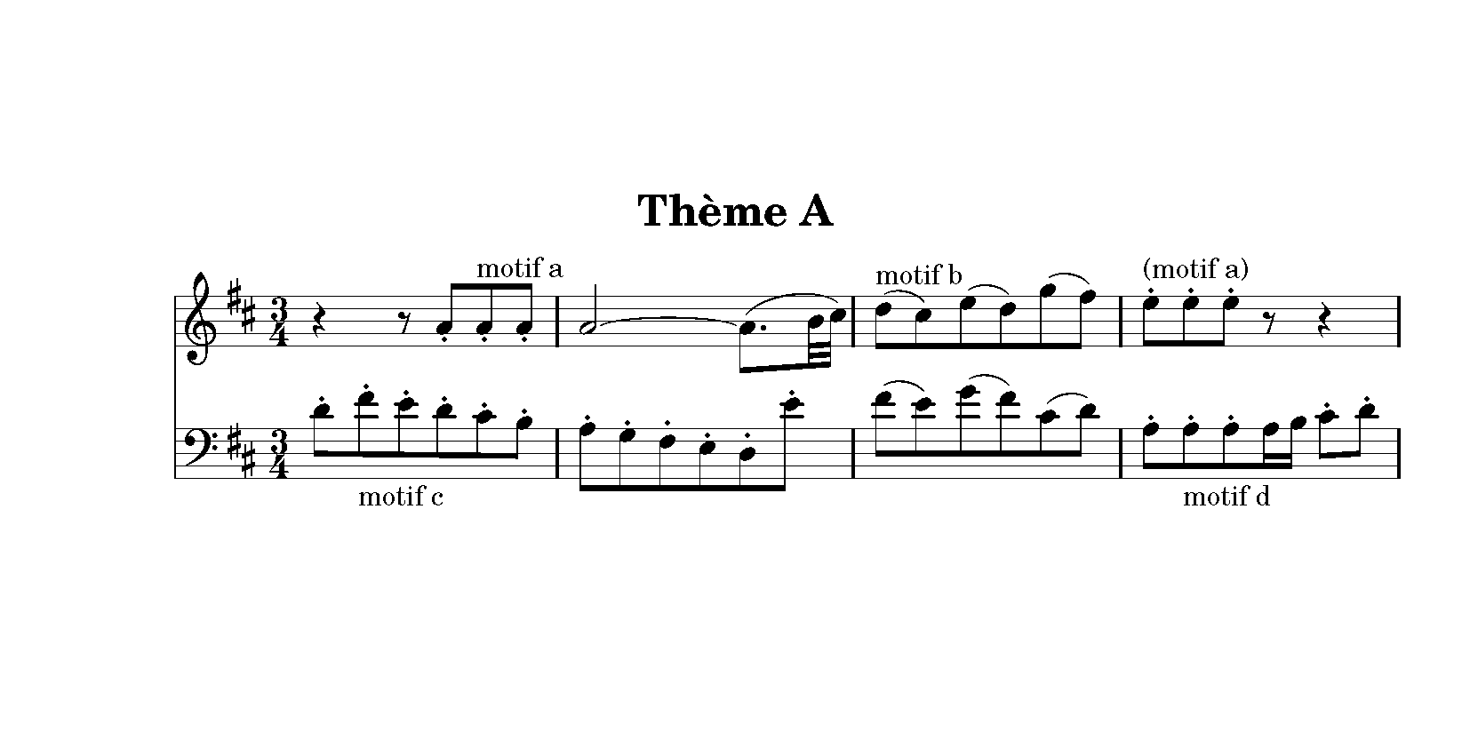 relevé du thème principal